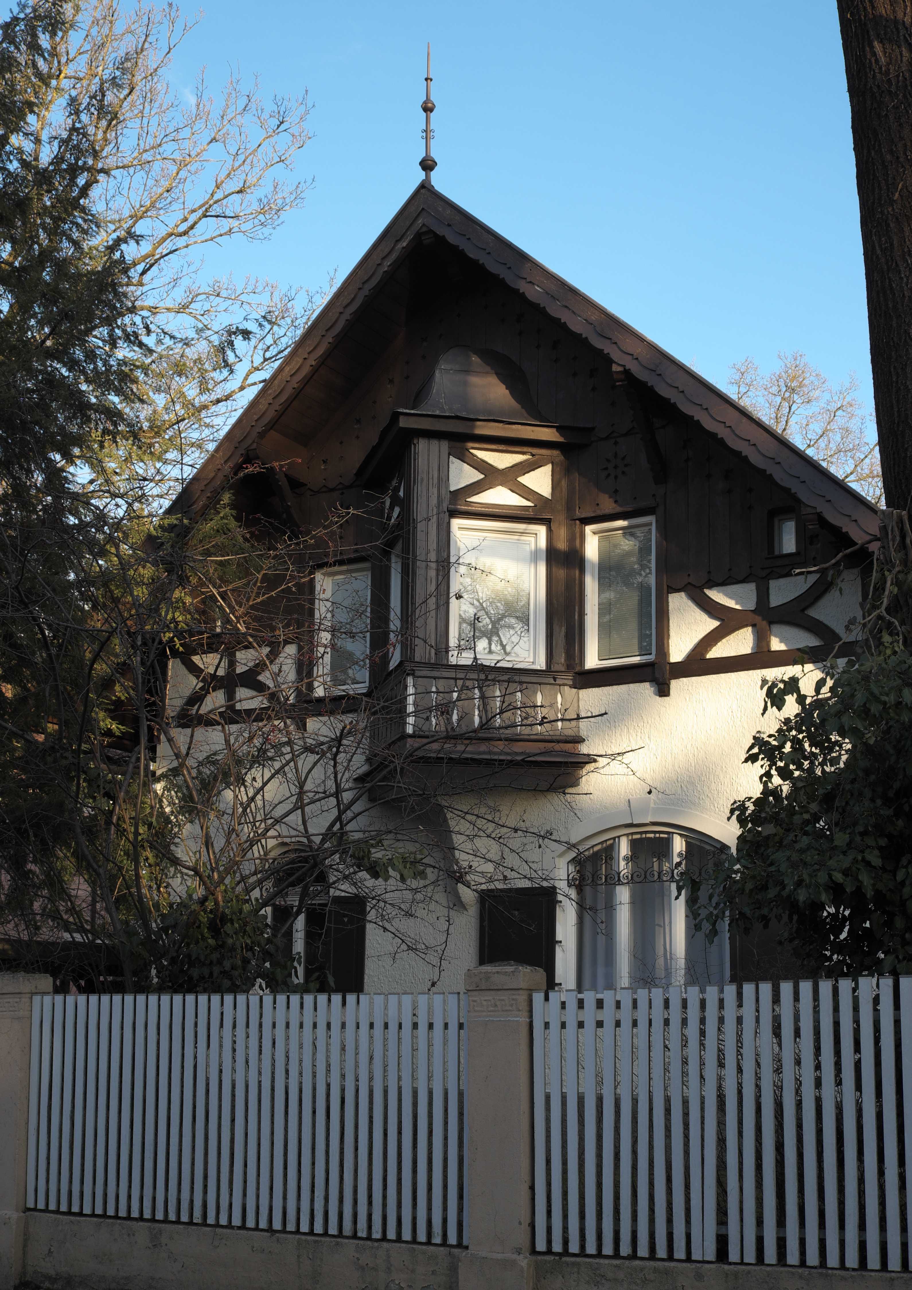 Villa in der Fritz-Reuter-Straße 16 in Pasing im Stadtbezirk Pasing-Obermenzing in München (Bayern/Deutschland), um 1893, aus dem Büro August Exter